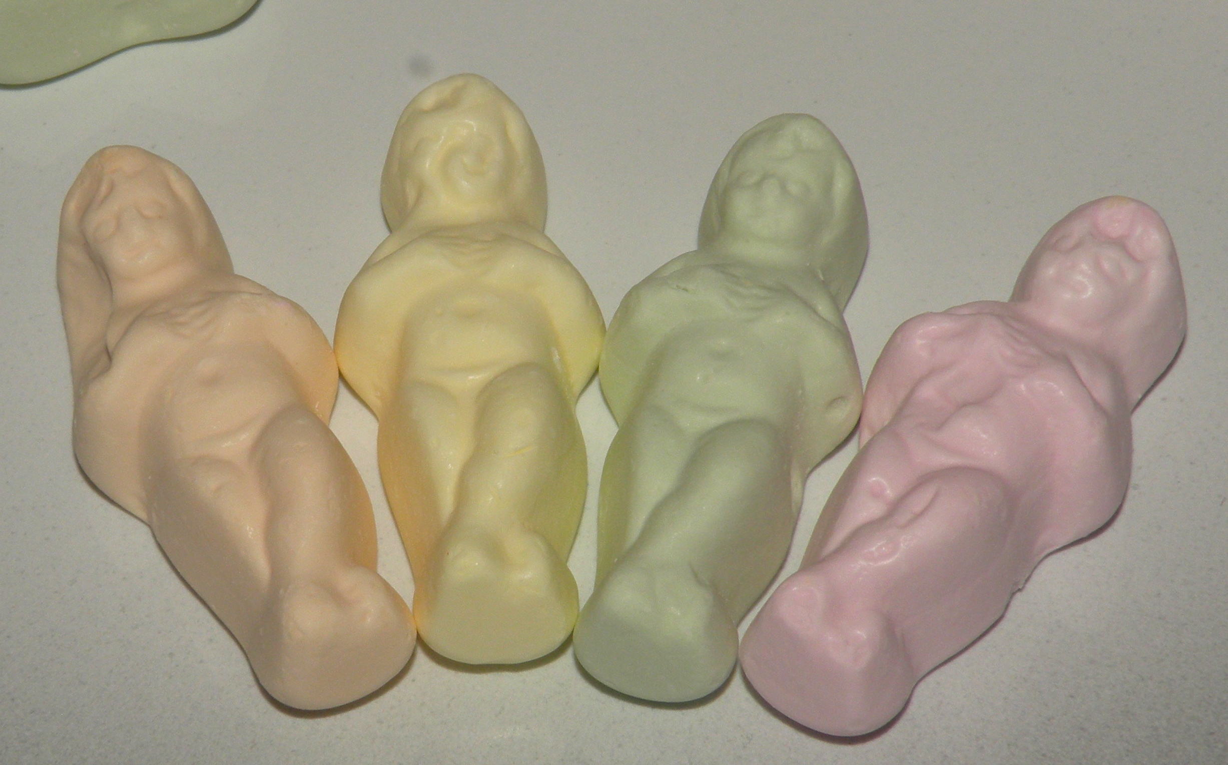 Meringue tendre petit jesus